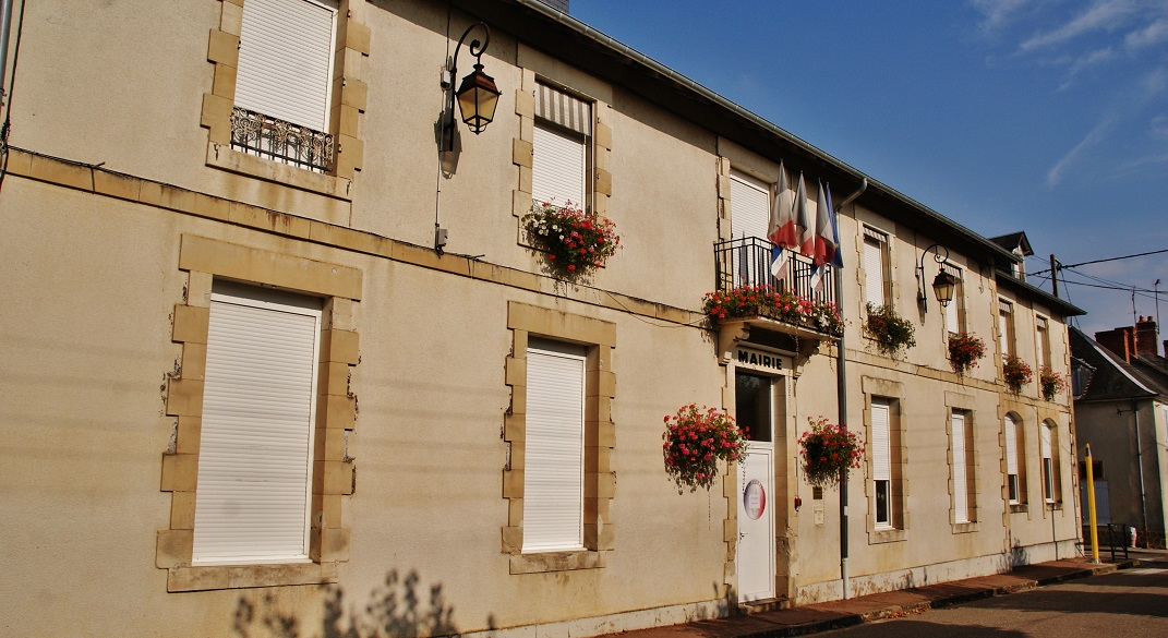 La Mairie